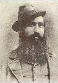 Il brigante Carmine Crocco